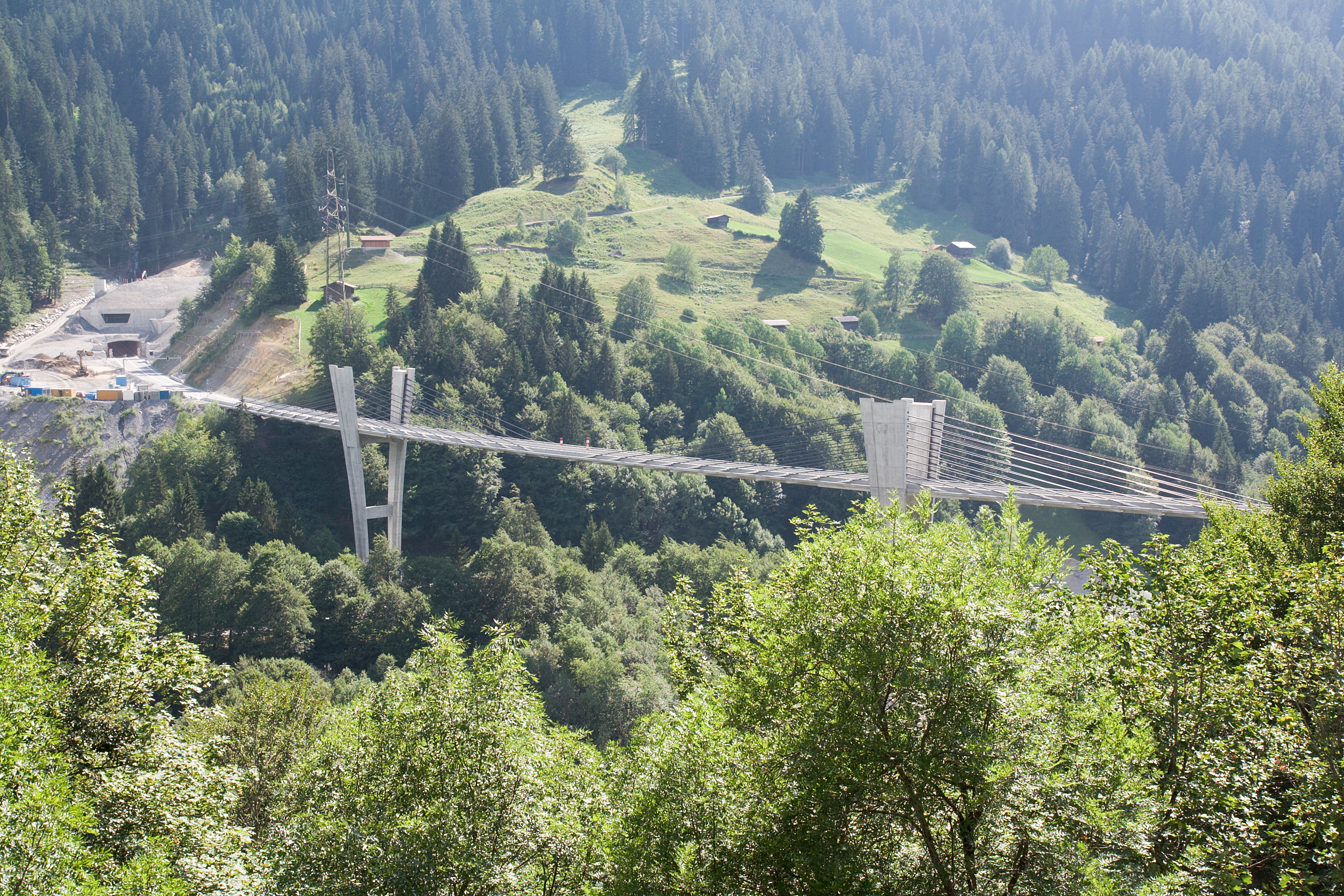 Die Sunniberbgrücke zwischen Serneus und Klosters Dorf, Schweiz; Aufnahme von der alten Hauptstrasse aus